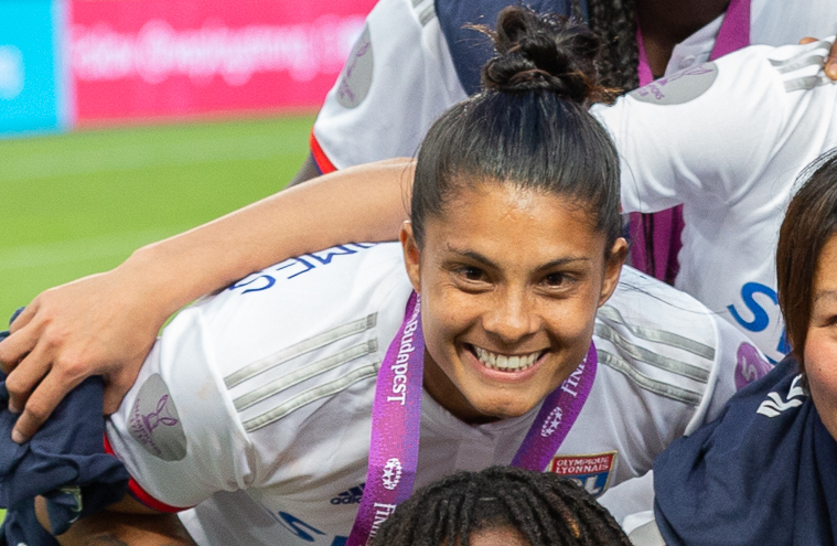 Fußball, Frauen, UEFA Women's Champions League, Olympique Lyonnais - FC Barcelona; Olympique Lyonnais feiert den erneuten Titel; Jubel, celebration